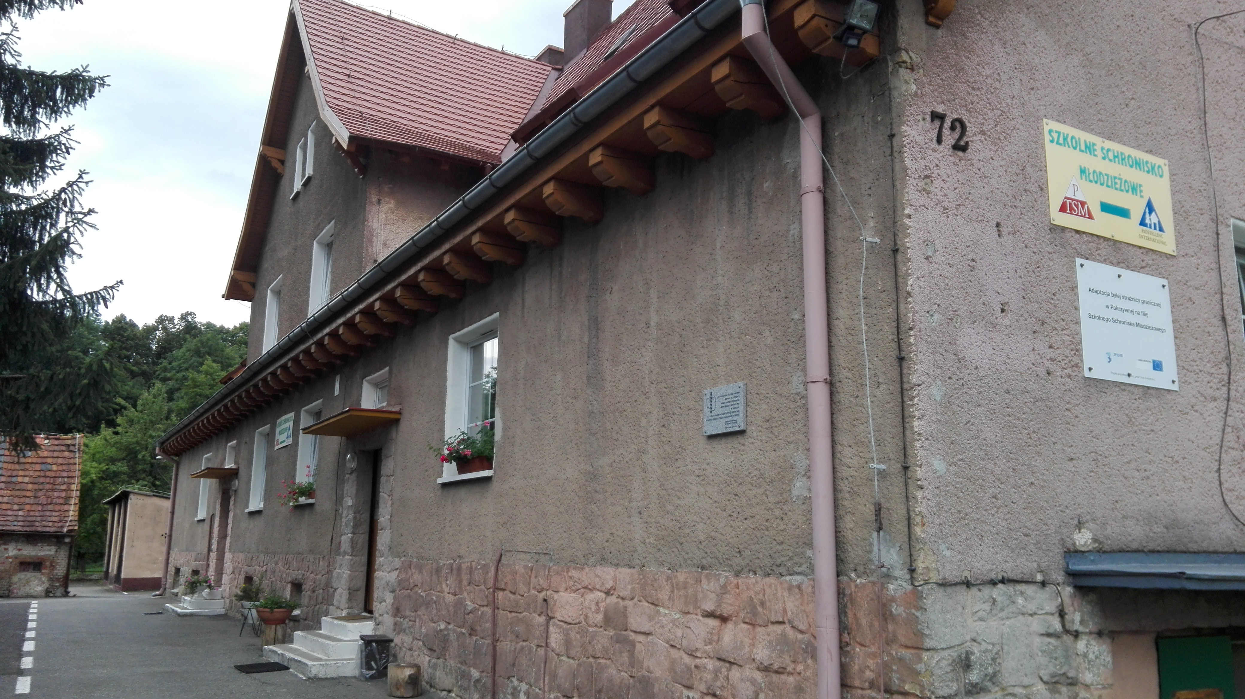 Szkolne Schronisko Młodzieżowe. W latach 1946-1990 Strażnica Wojsk Ochrony Pogranicza, a 1994-2001 Strażnica Straży Granicznej.